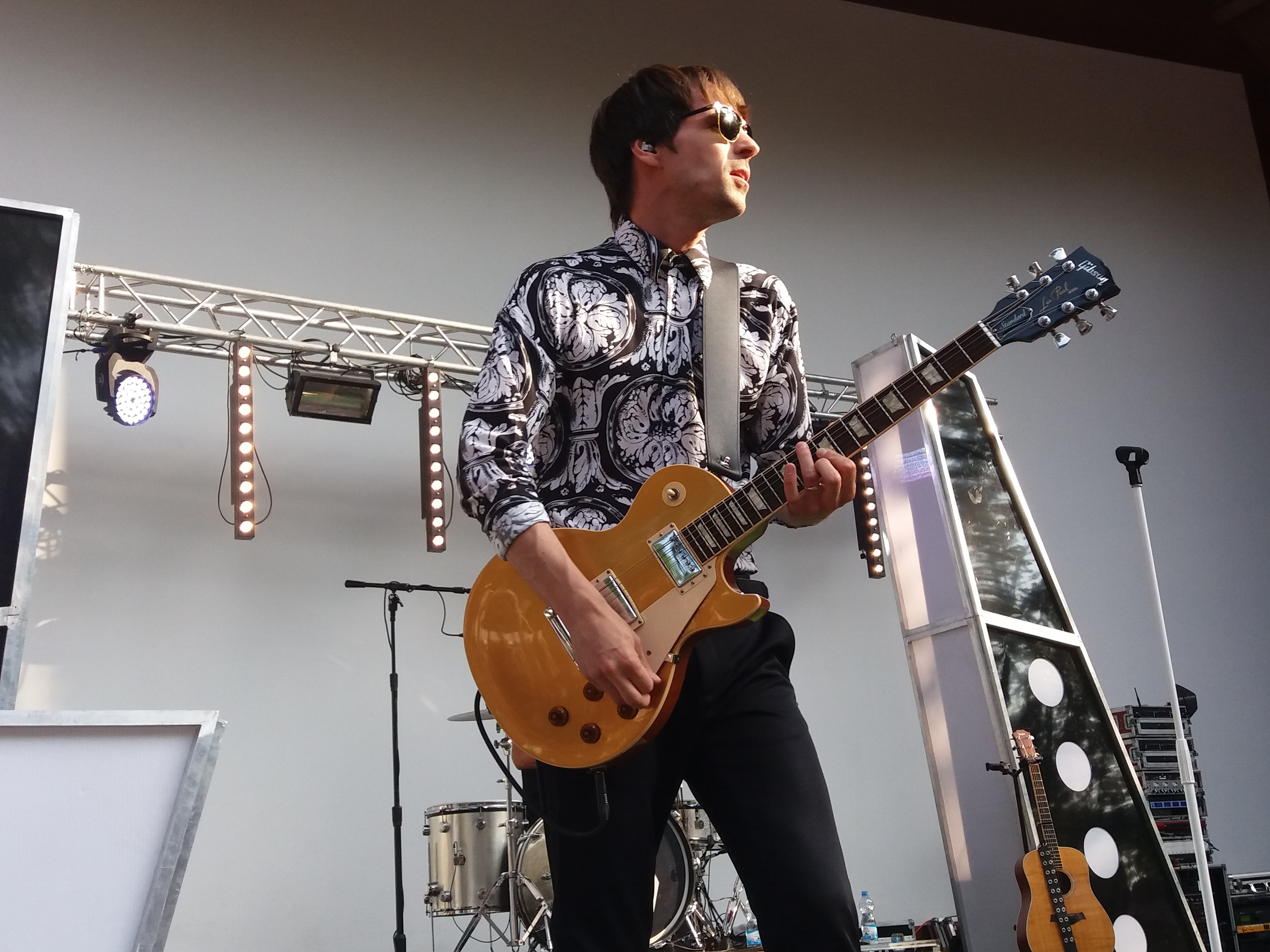 Lukáš Bundil se skupinou Slza na koncertě ve Valašském Meziřící 03. 06. 2018.